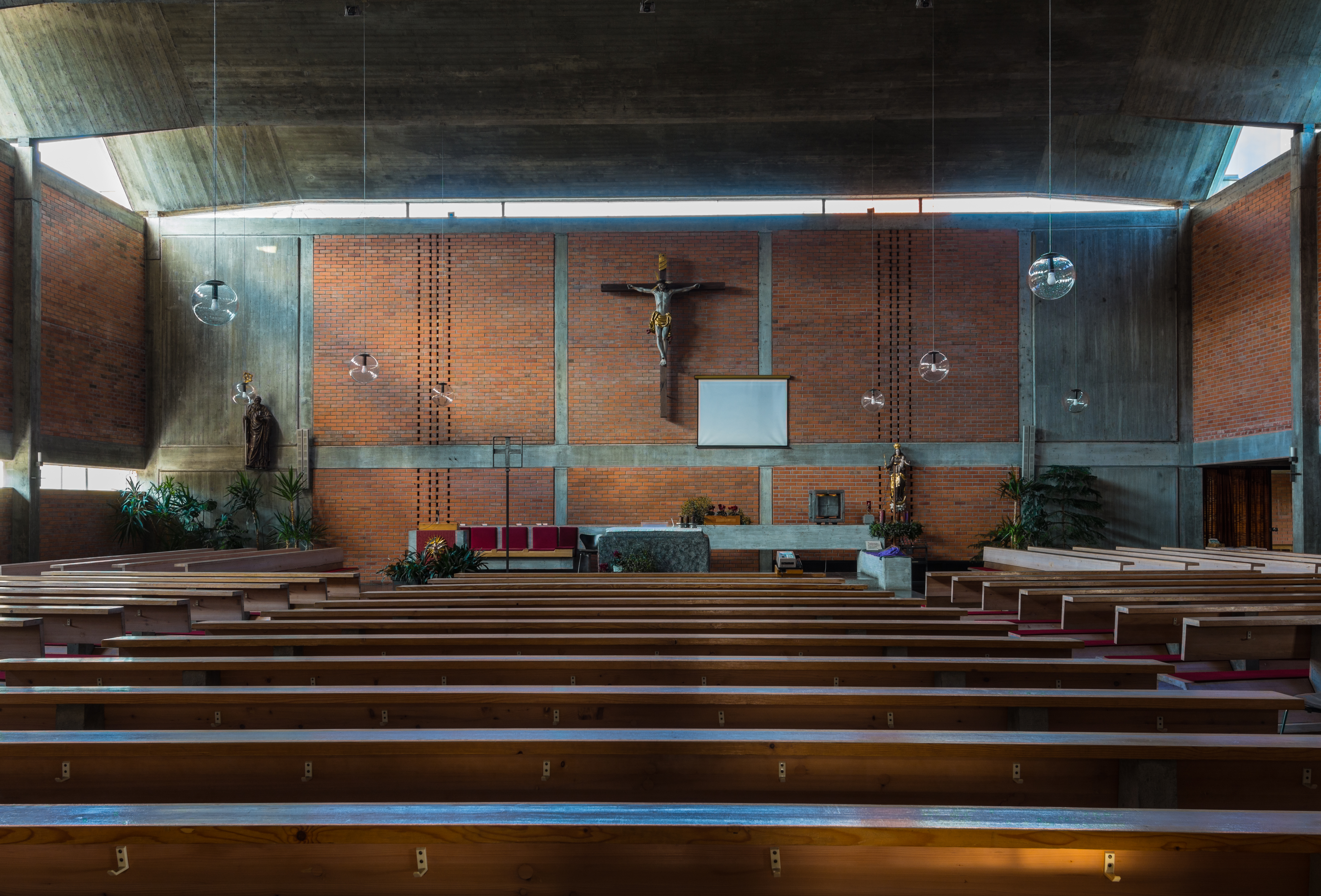 Kath. Pfarrkirche hl. Matthäus, Anbau aus der 70er Jahren des 20. Jahrhunderts